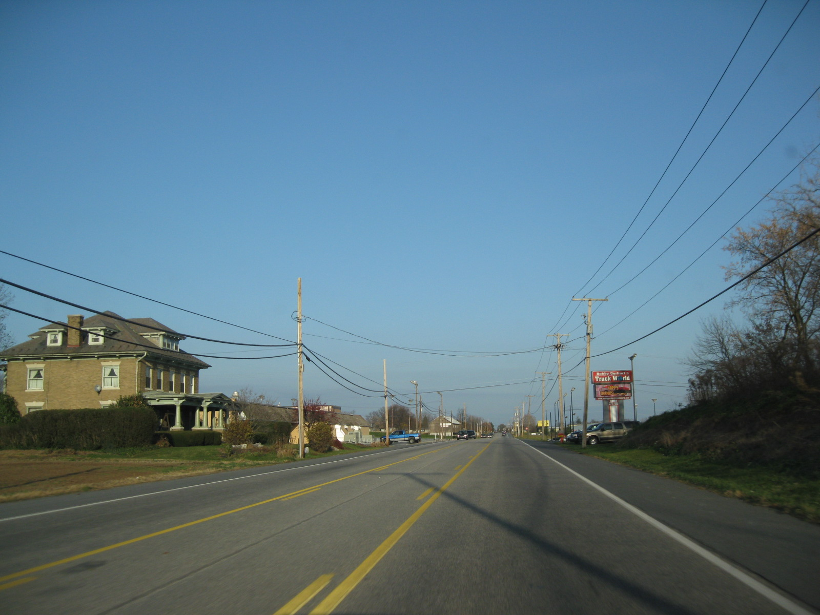 US Route 422 - Pennsylvania